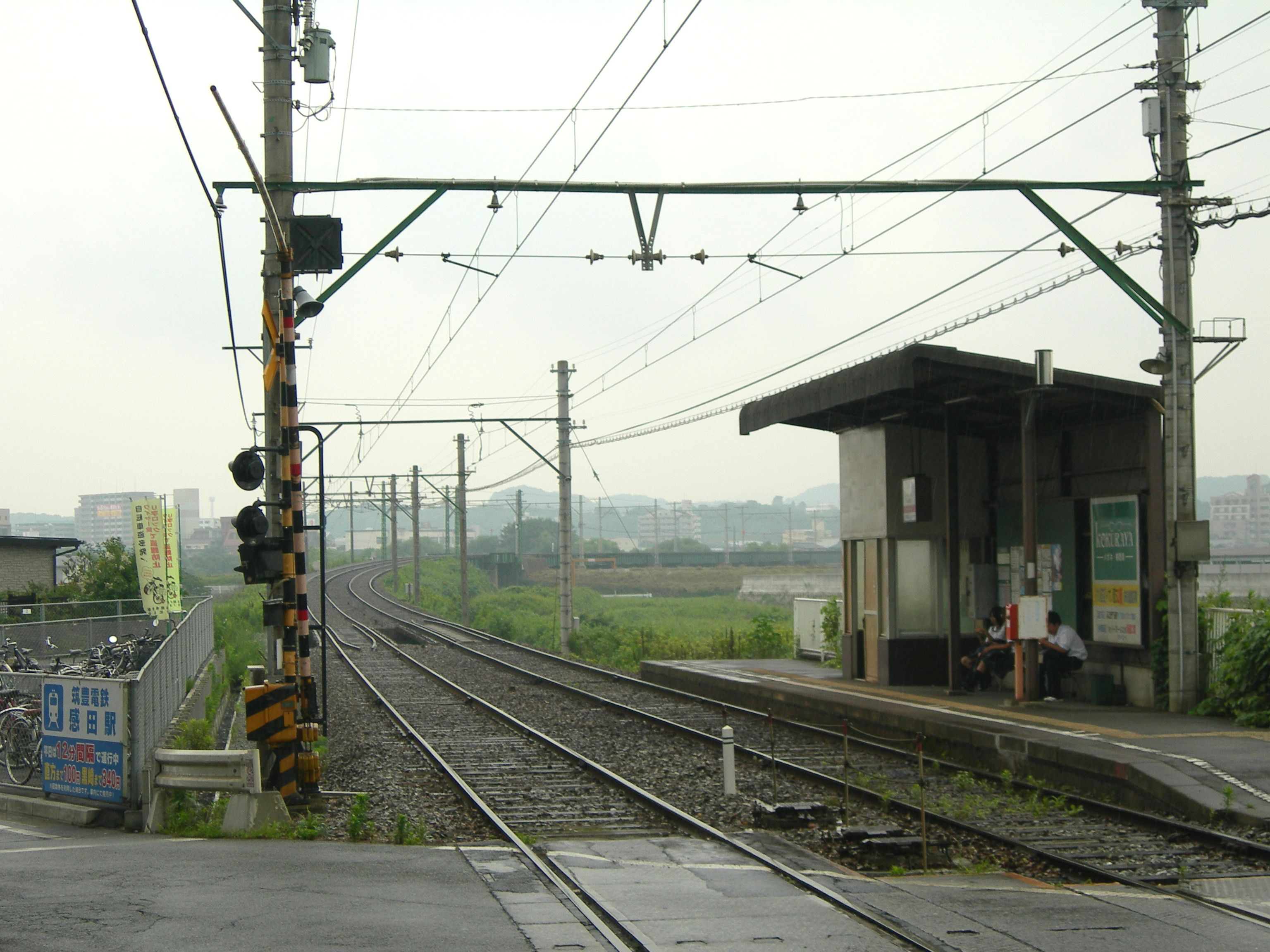 感田駅